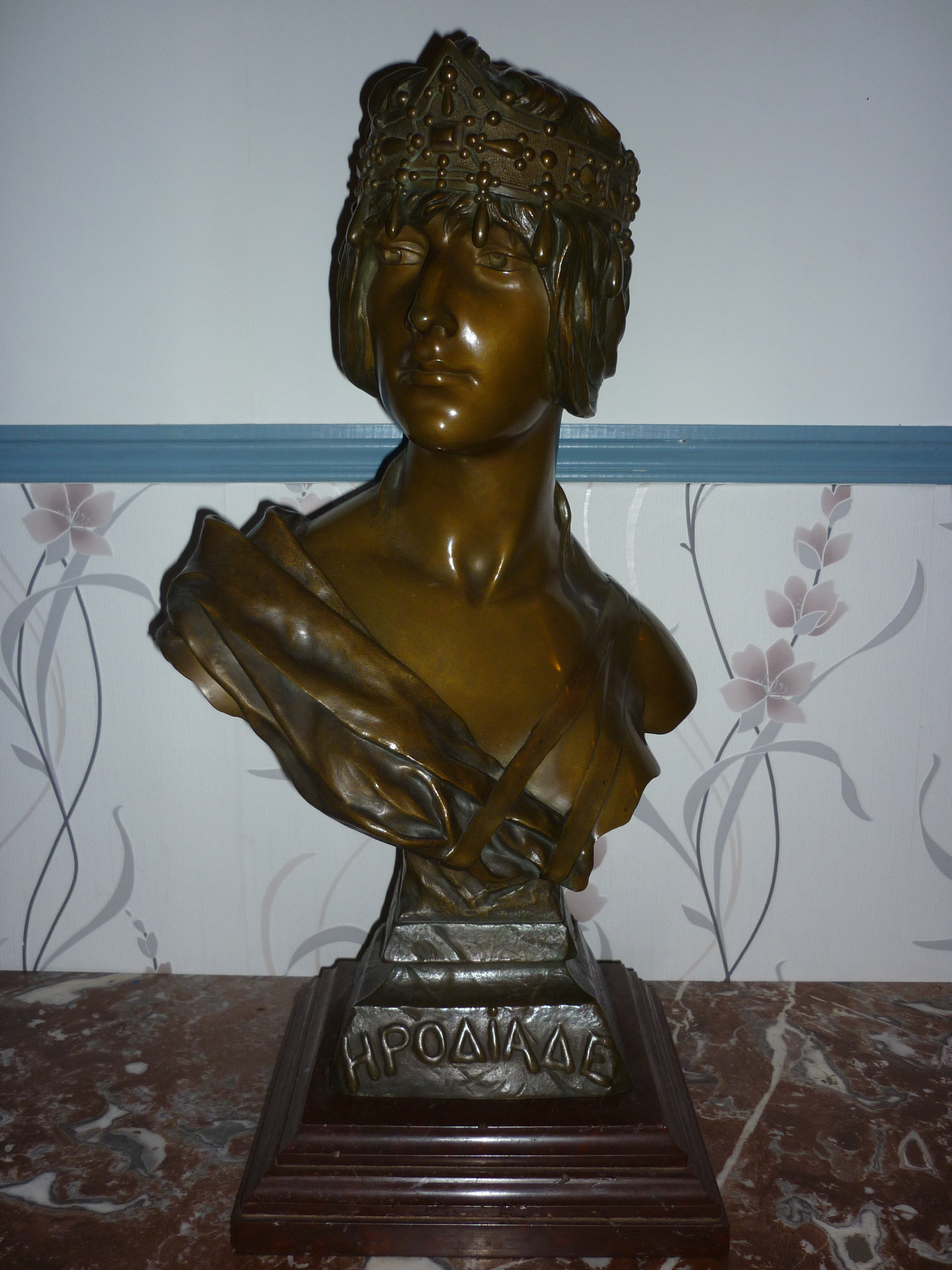 Buste en bronze Art nouveau orientaliste du sculpteur français Georges Charles Coudray. Hauteur 61 cm